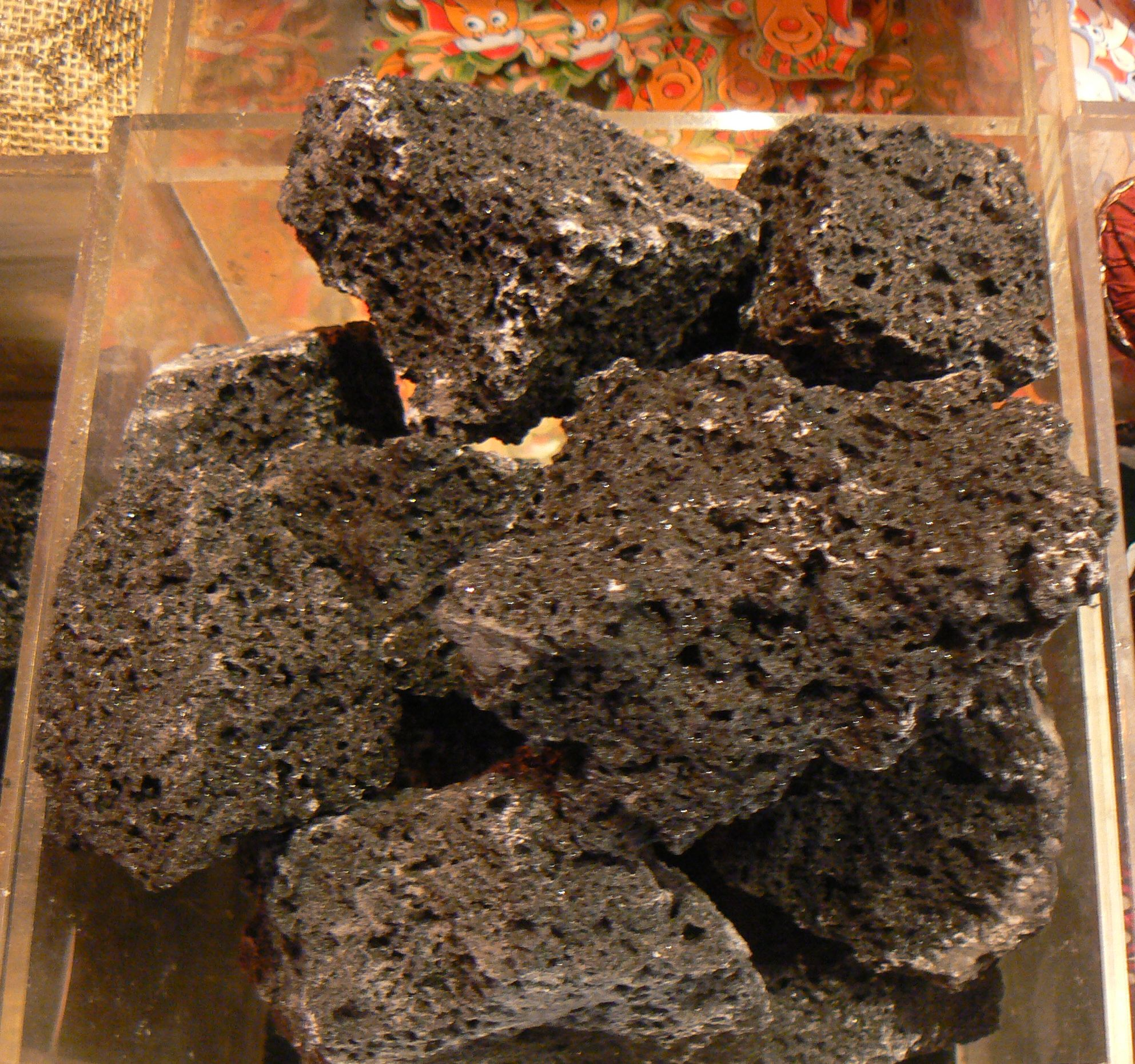 Els Reis Mags porten carbó de nadal o carbó de sucre als nens que es porten malament.